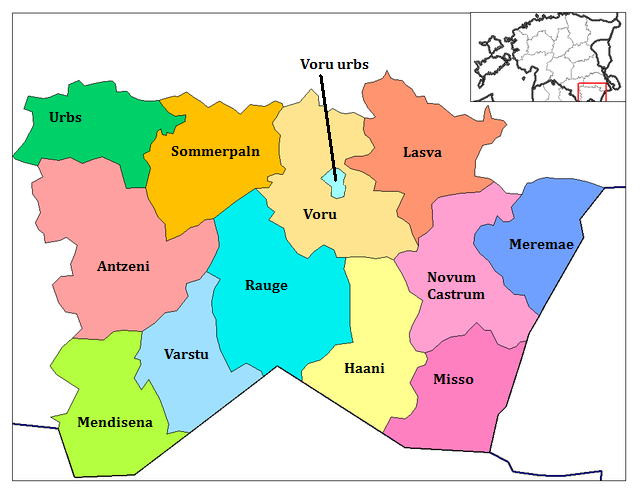 Vorus municipia Latine